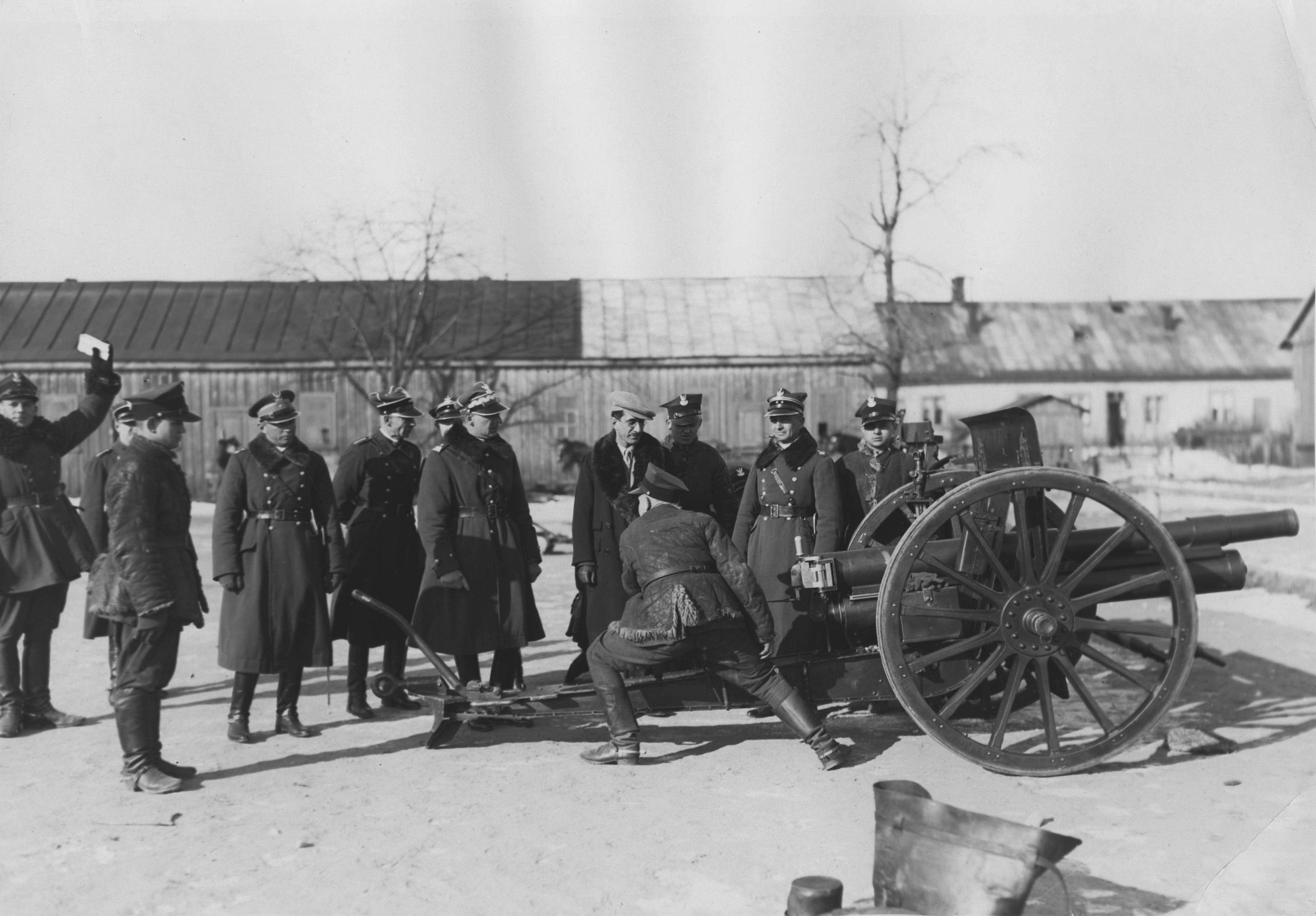 Wizyta posła Afganistanu Shah Khan Wali w 1 Pułku Szwoleżerów i 1 Dywizjonie Artylerii Konnej w Warszawie. Shah Khan Wali (w kaszkiecie i okularach) w 1 Dywizjonie Artylerii Konnej w towarzystwie, m.in.: gen. Bolesława Wieniawy-Długoszowskiego (na lewo od posła Wali) i mjr. Józefa Trepto (na lewo od gen. Długoszowskiego). Widoczna armata polowa 75 mm wz.1902/26. Koncern Ilustrowany Kurier Codzienny - Archiwum Ilustracji. Sygnatura: 1-W-1370-4